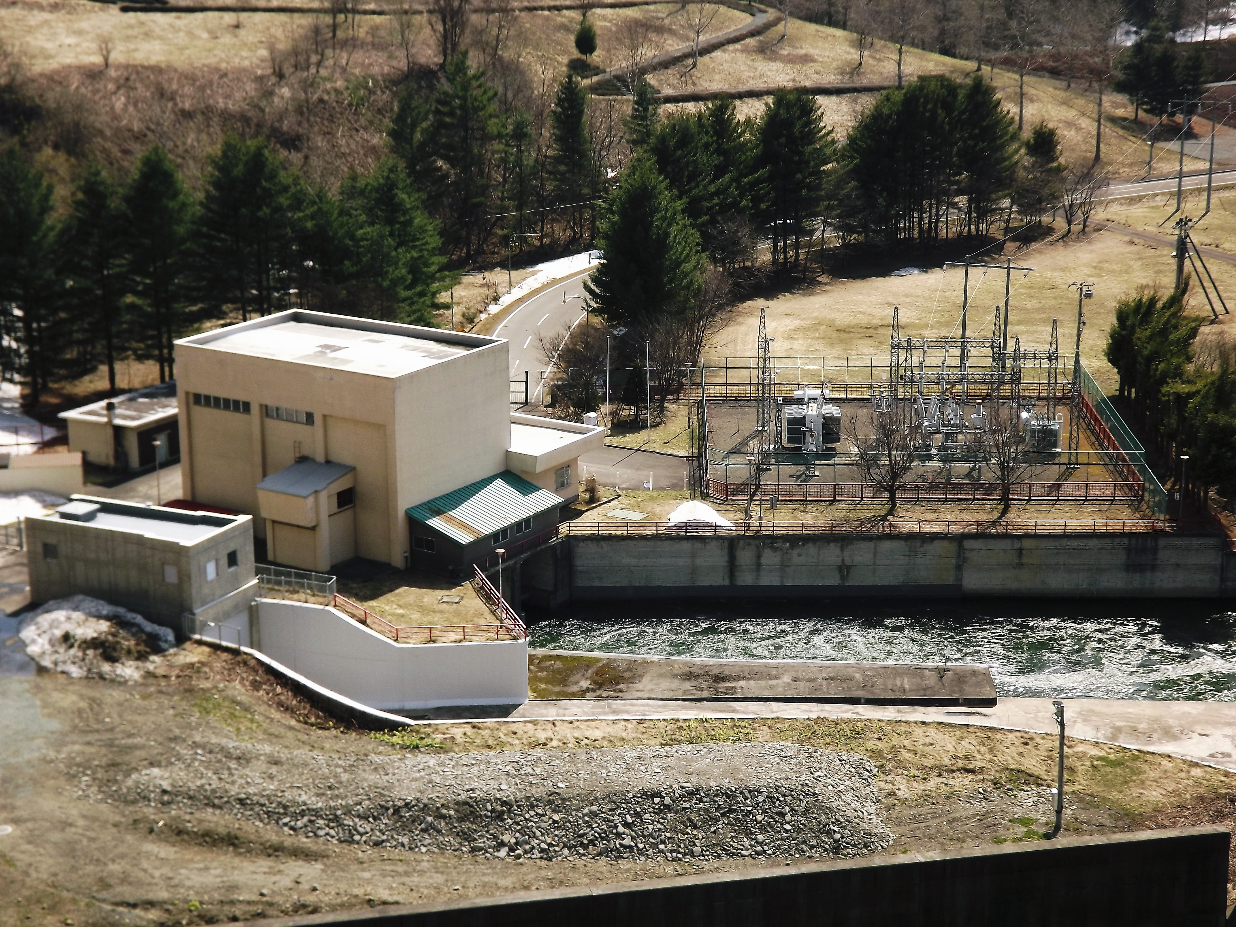 岩尾内発電所（北海道・天塩川。北海道企業局管理）